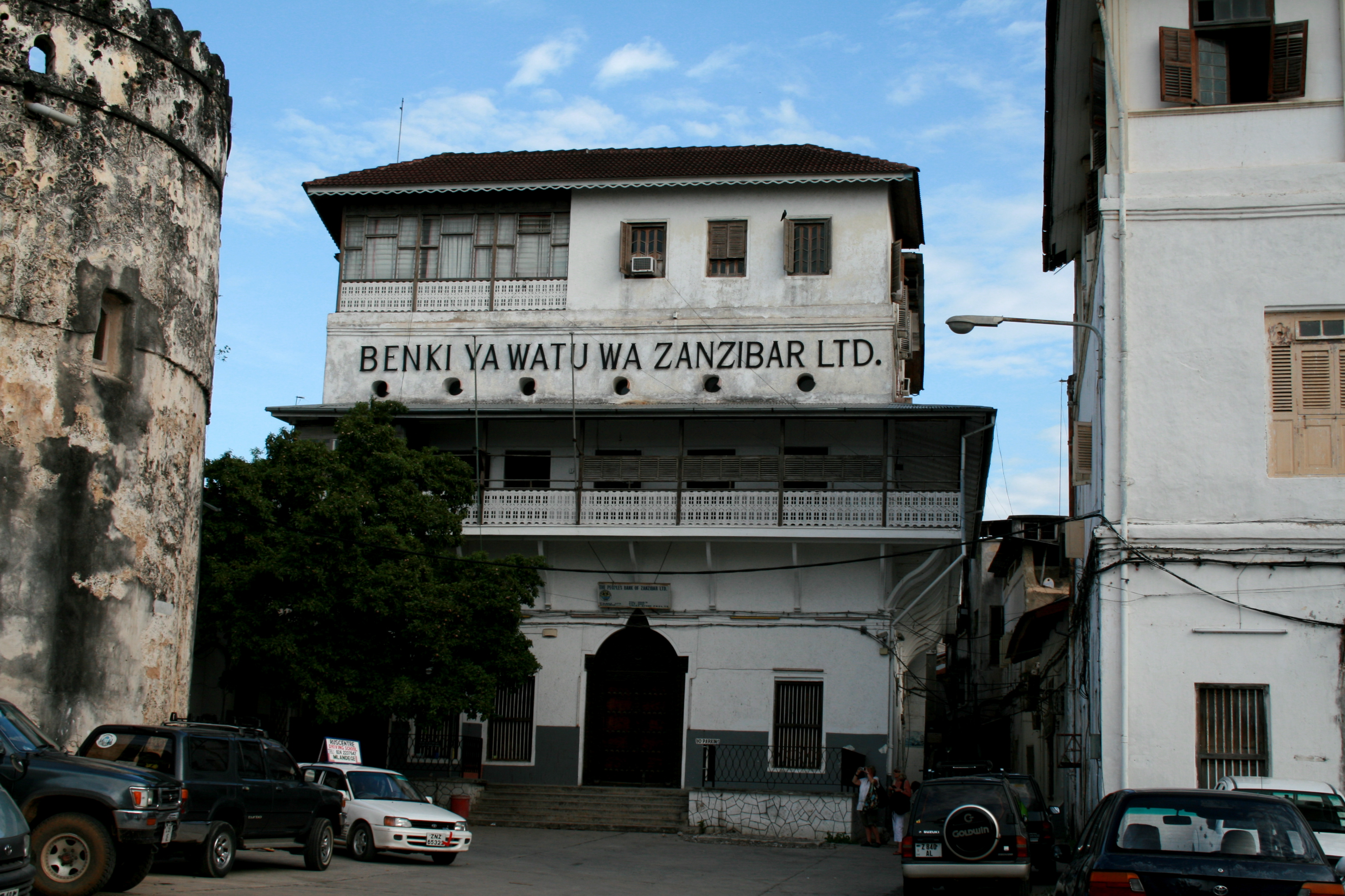 Zanzibar stone town